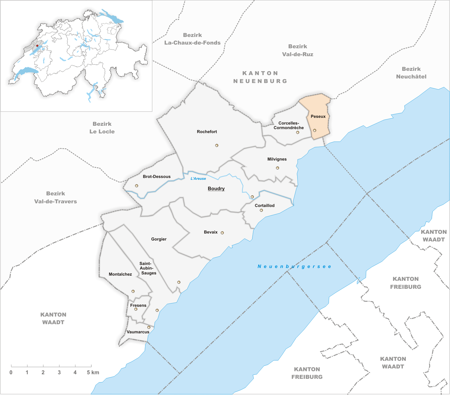 Municipality Peseux